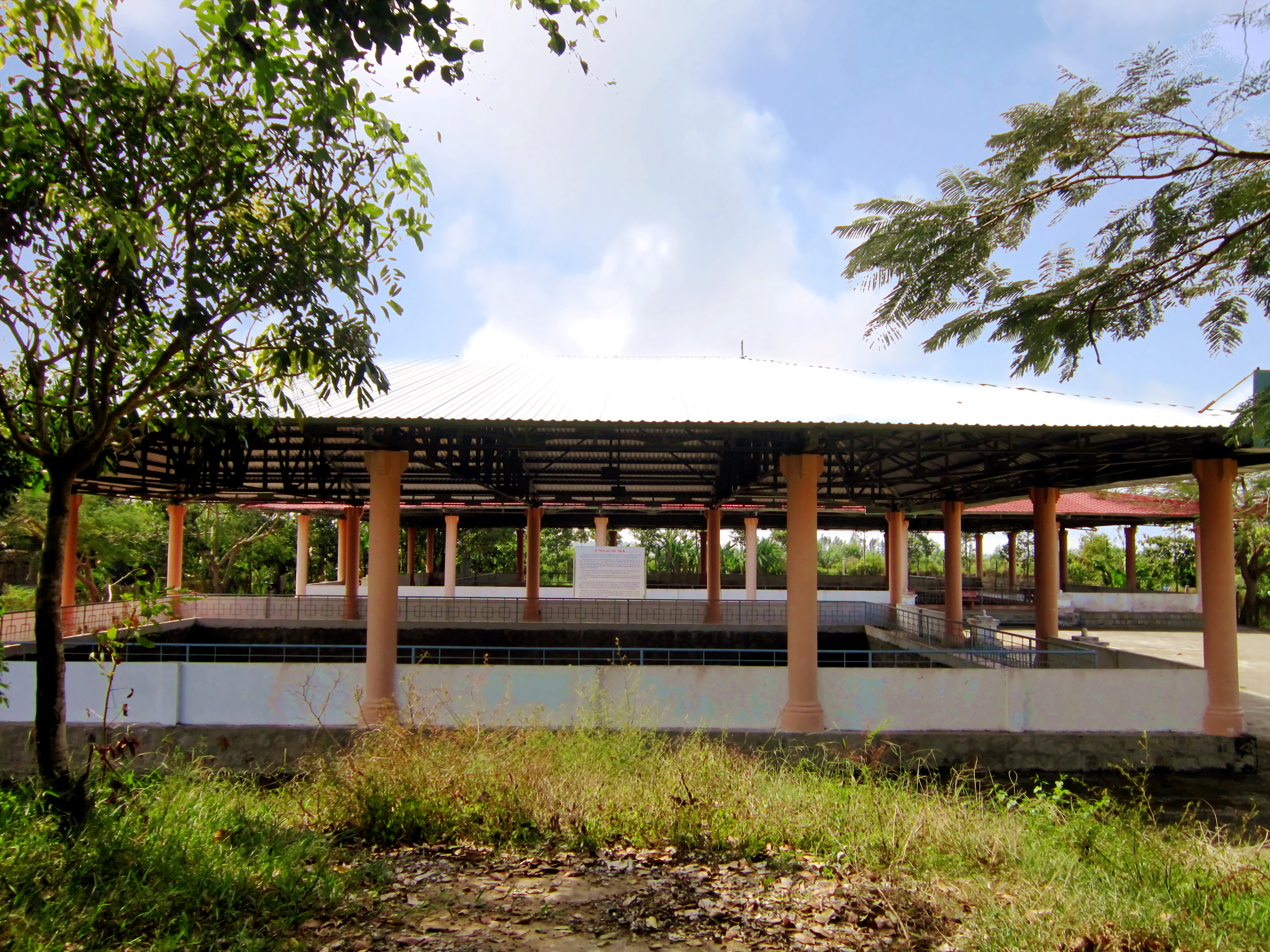 Khu di tích Gò Cây Thị (một trong những di chỉ thuộc nền văn hóa Okeo) ở thị trấn Óc Eo, huyện Thoại Sơn, An Giang, Việt Nam.